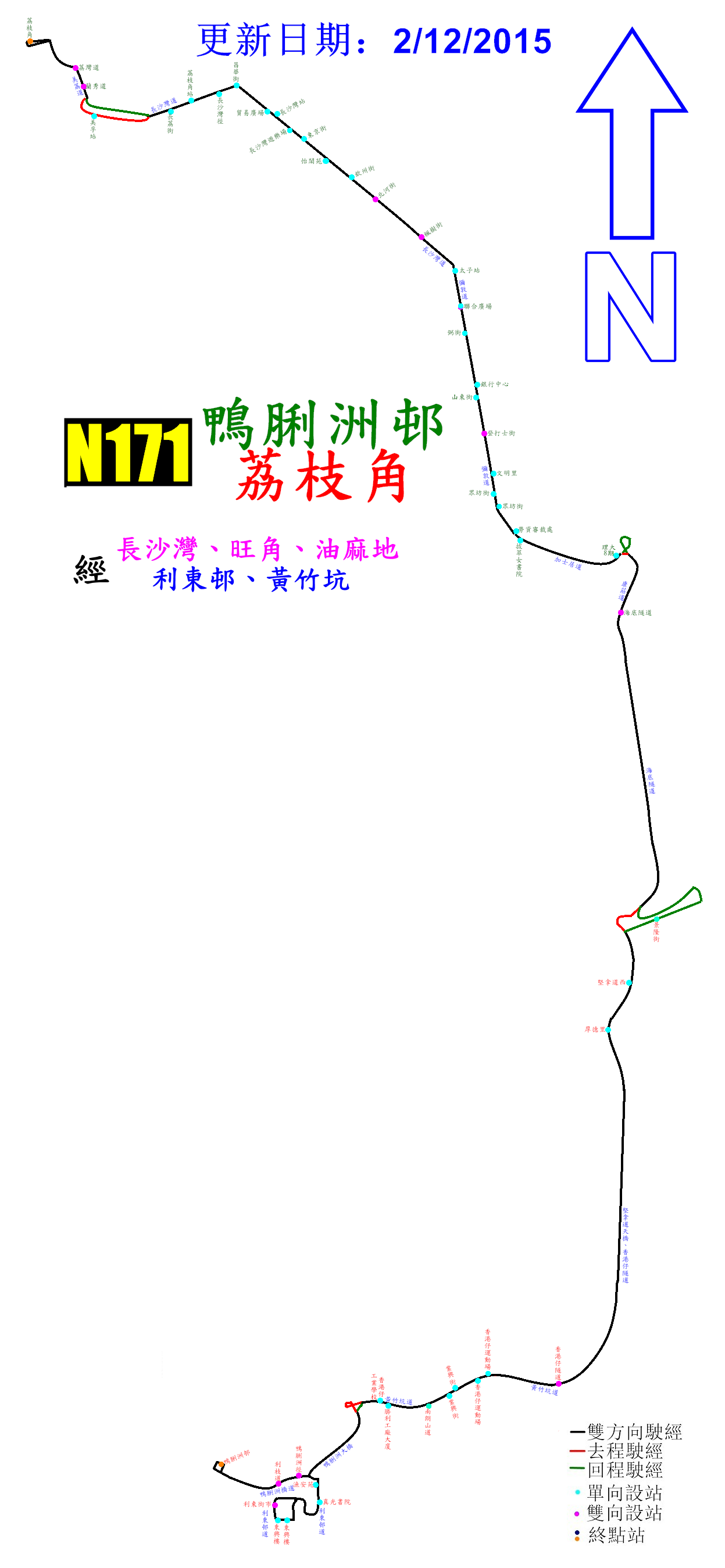 中文（香港）: 過海隧巴N171線的走線圖，其走線與日間的171路線相近，惟不入海怡半島